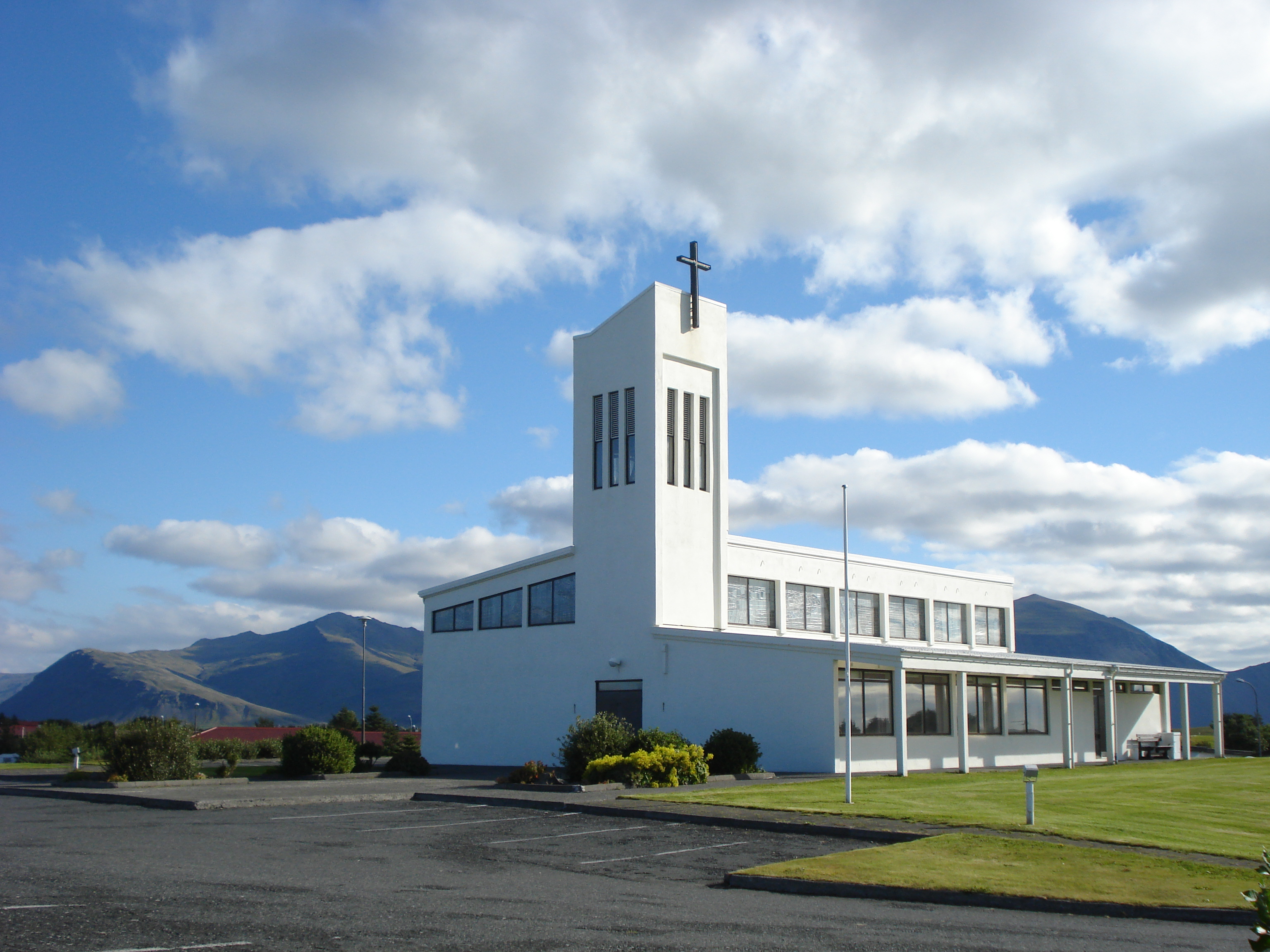 Hafnarkirkja, Höfn í Hornafirði, Skaftafellsprófastsdæmi